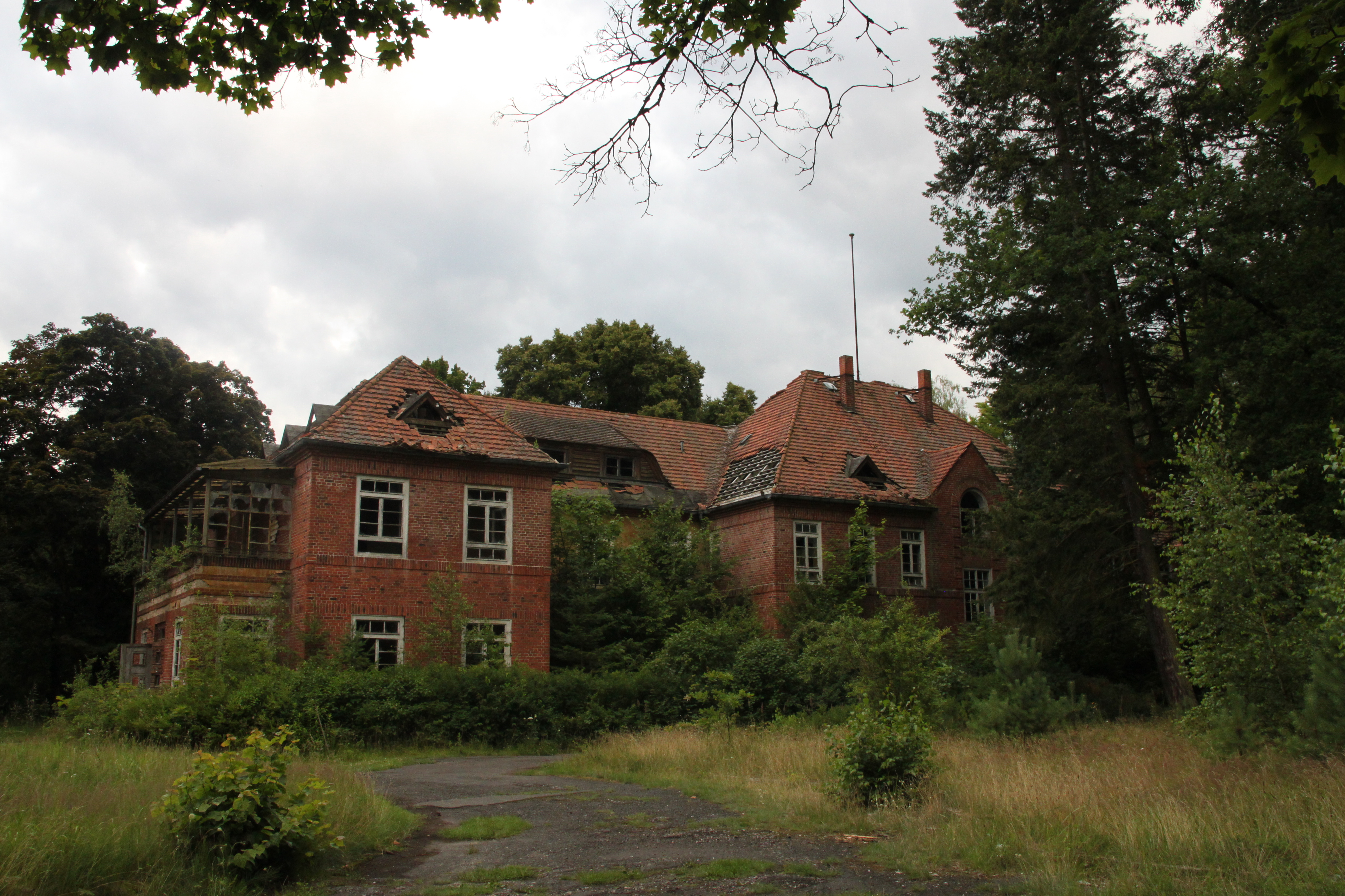 Heilstätte Grabowsee